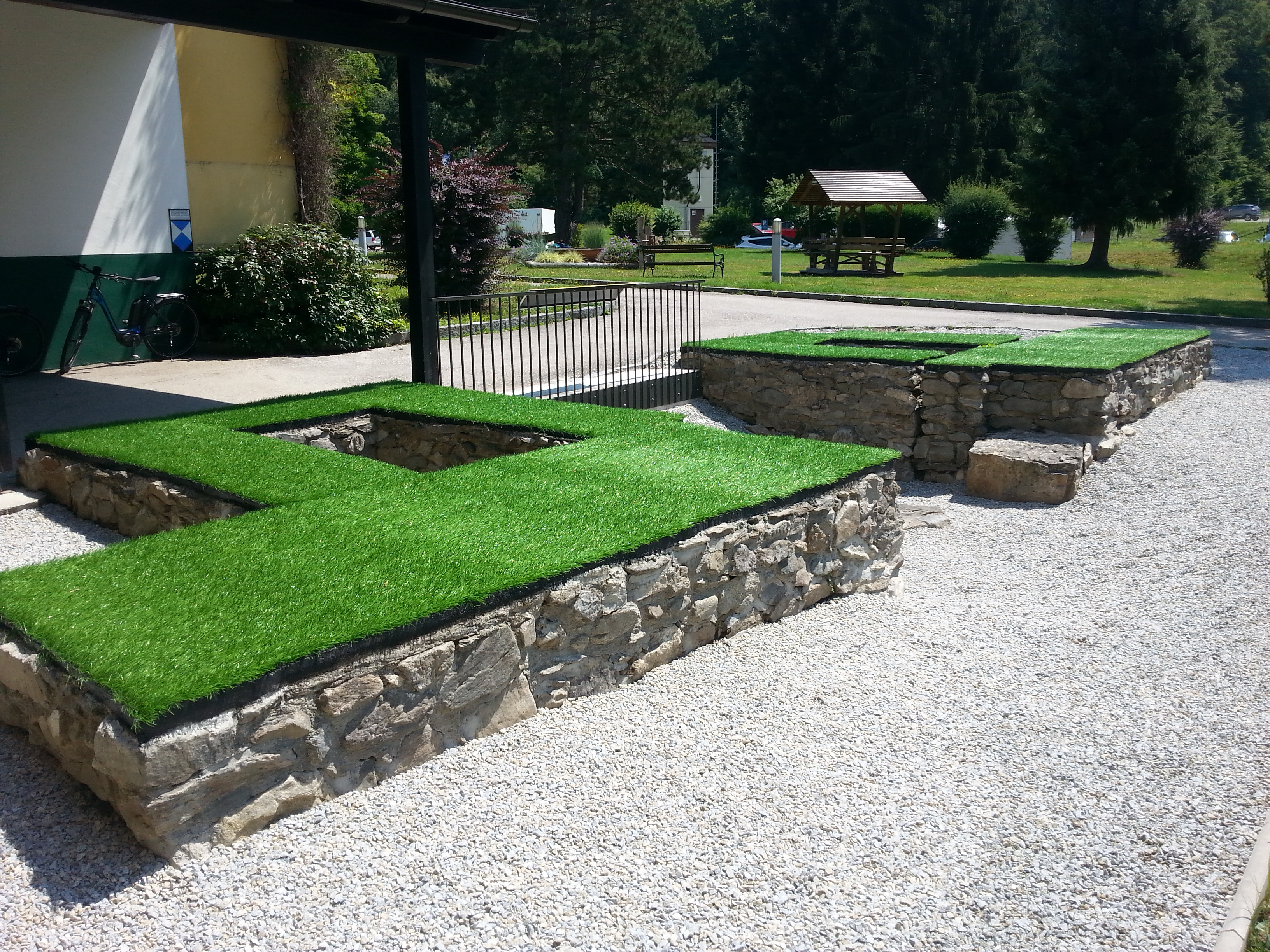 Teilweise wiederaufgebautes und konserviertes Westtor des Kastell Schlögen (Ioviacum). Neupräsentation im Zuge der OÖ Landesaustellung 2018.